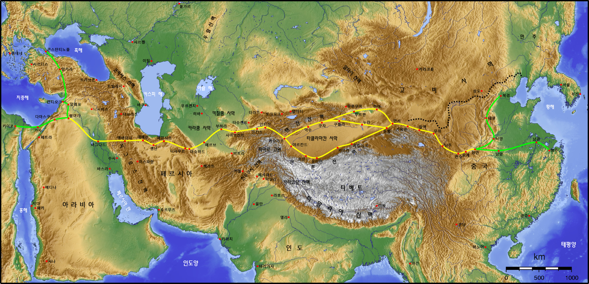 Silk Road(비단길)